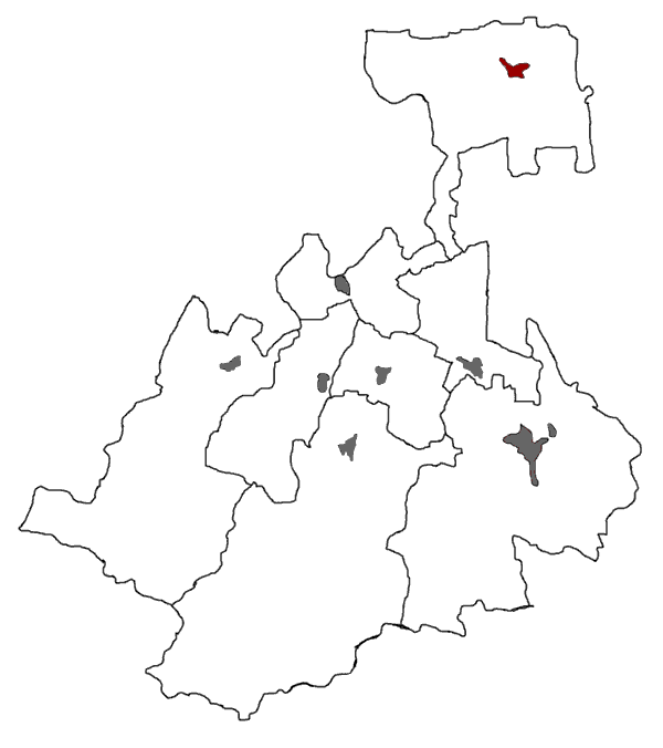 Расположение города Моздок на карте Северной Осетии.